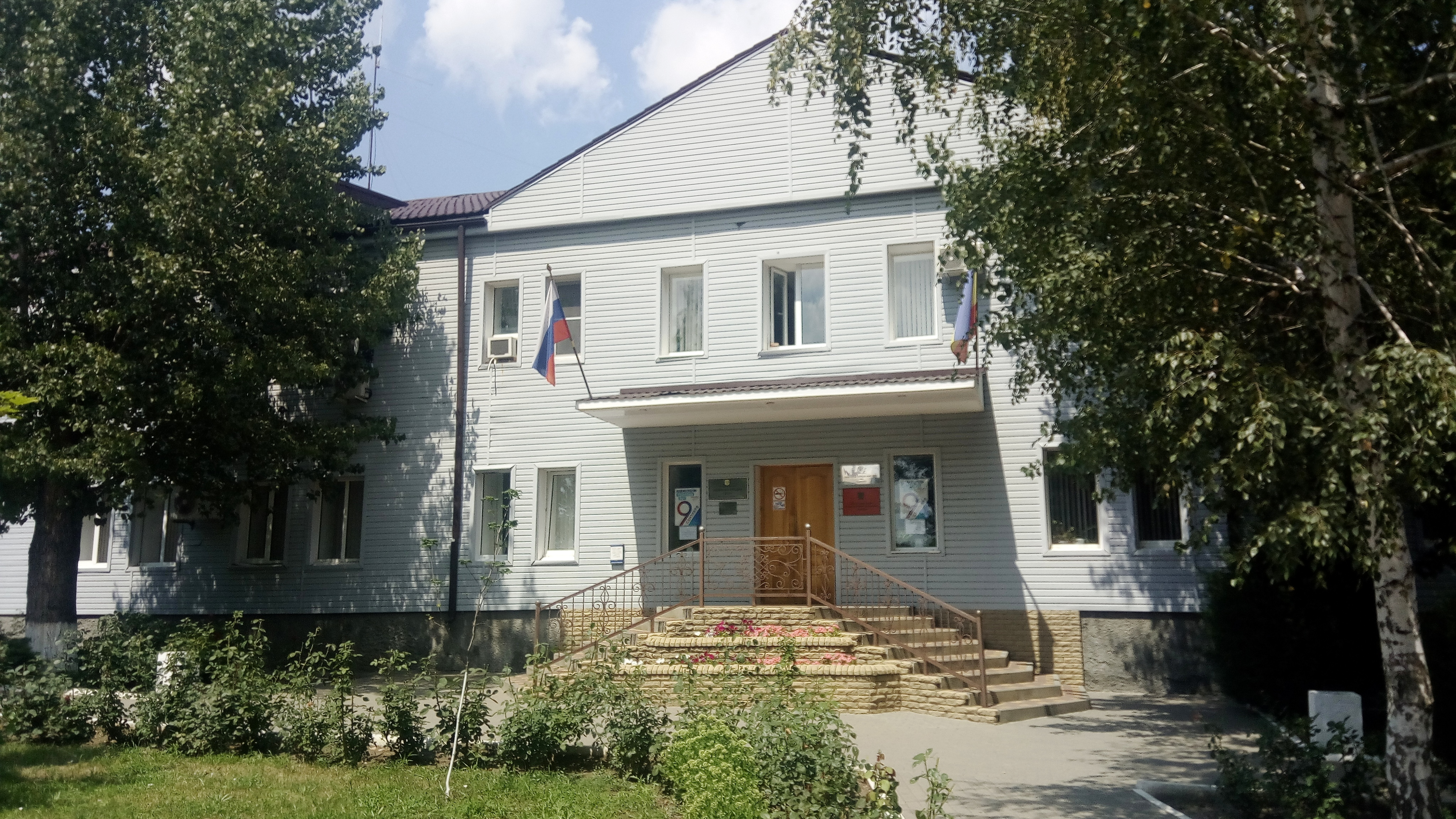 Здание городской администрации (Донецк РФ)